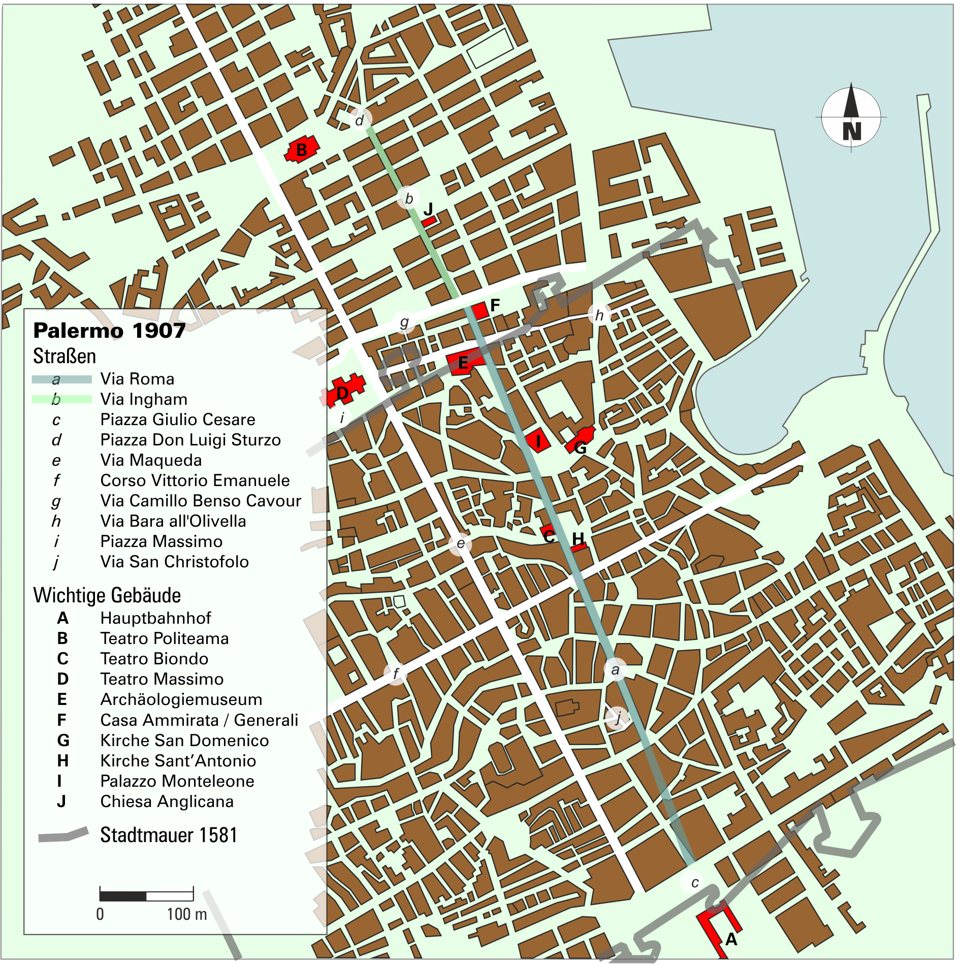 Karte der Via Roma (Palermo)